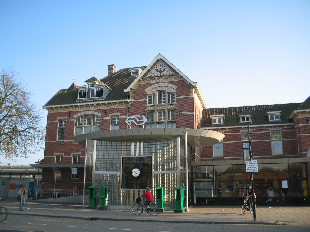 station Woerden, voorgevel, 12 oktober 2005